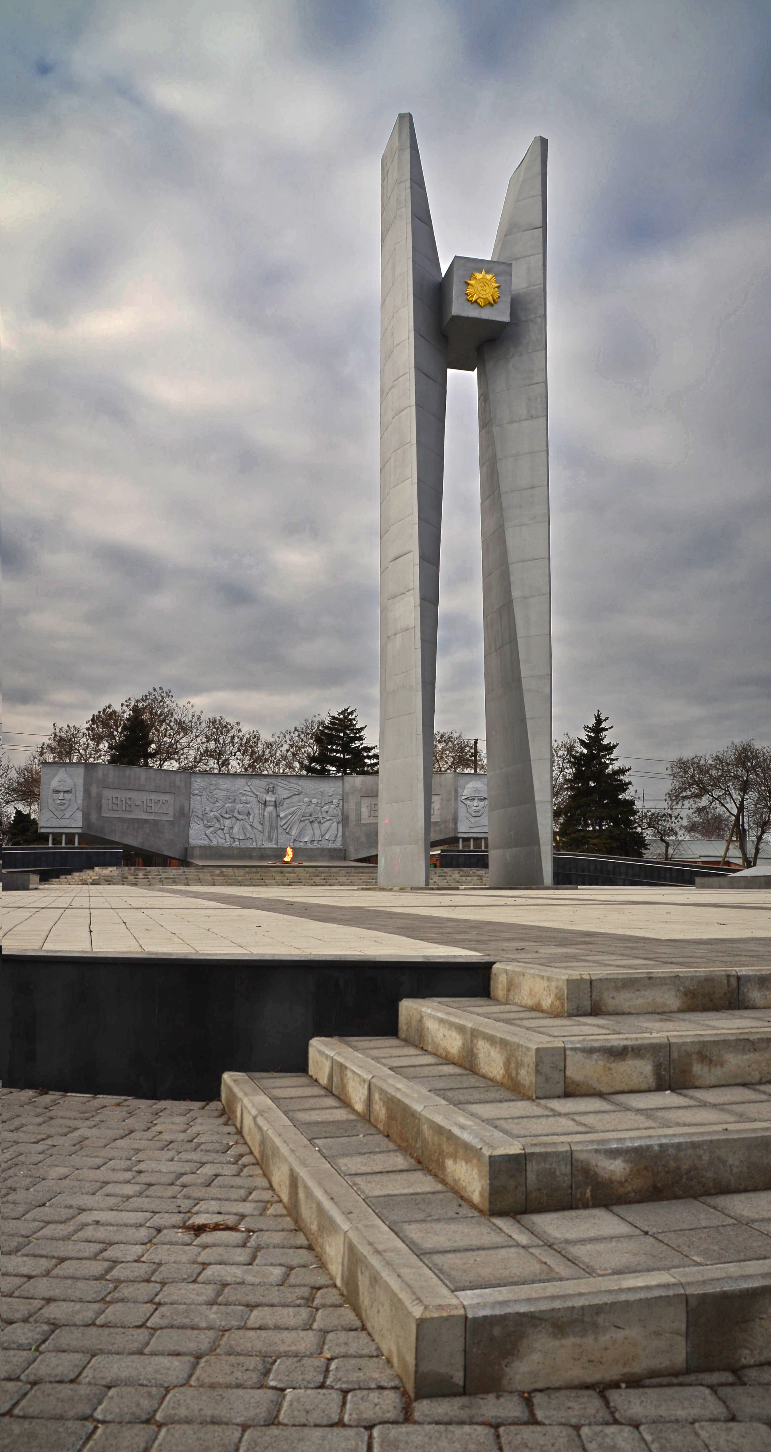 Мемориальный комплекс: площадь Революции, Ейск, Ейский район, Краснодарский край